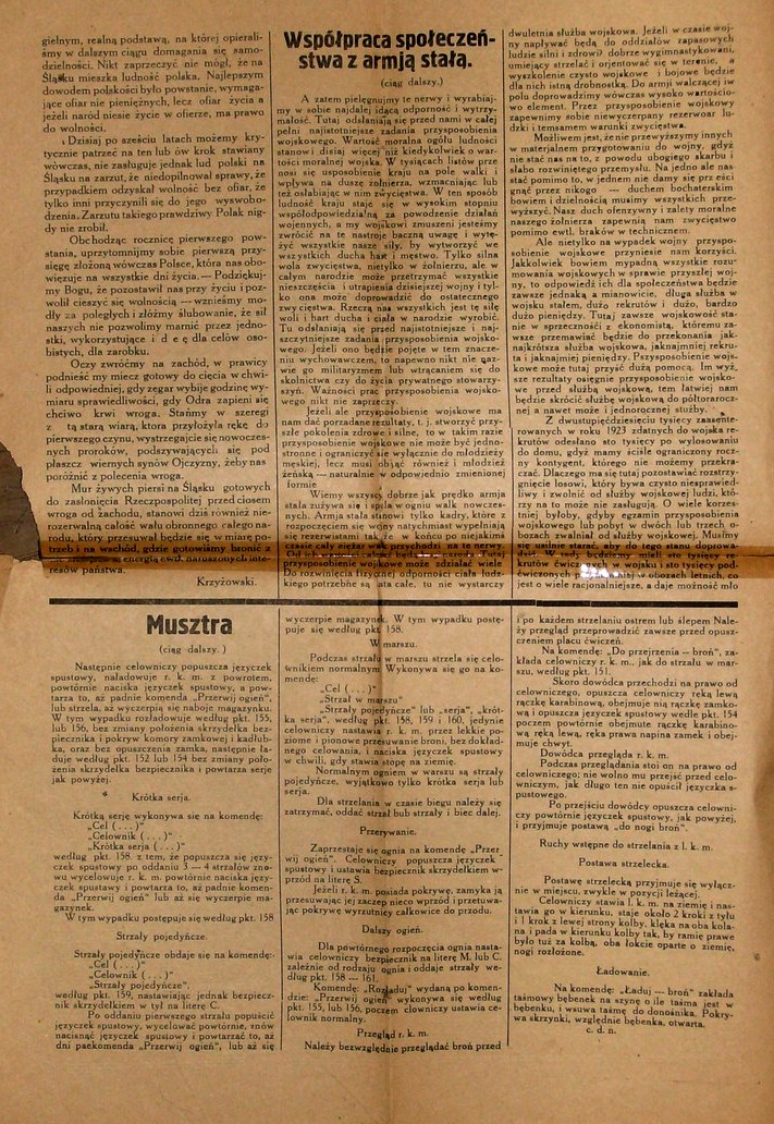 Gazeta Śląska z 1925, nr 32, s. 2